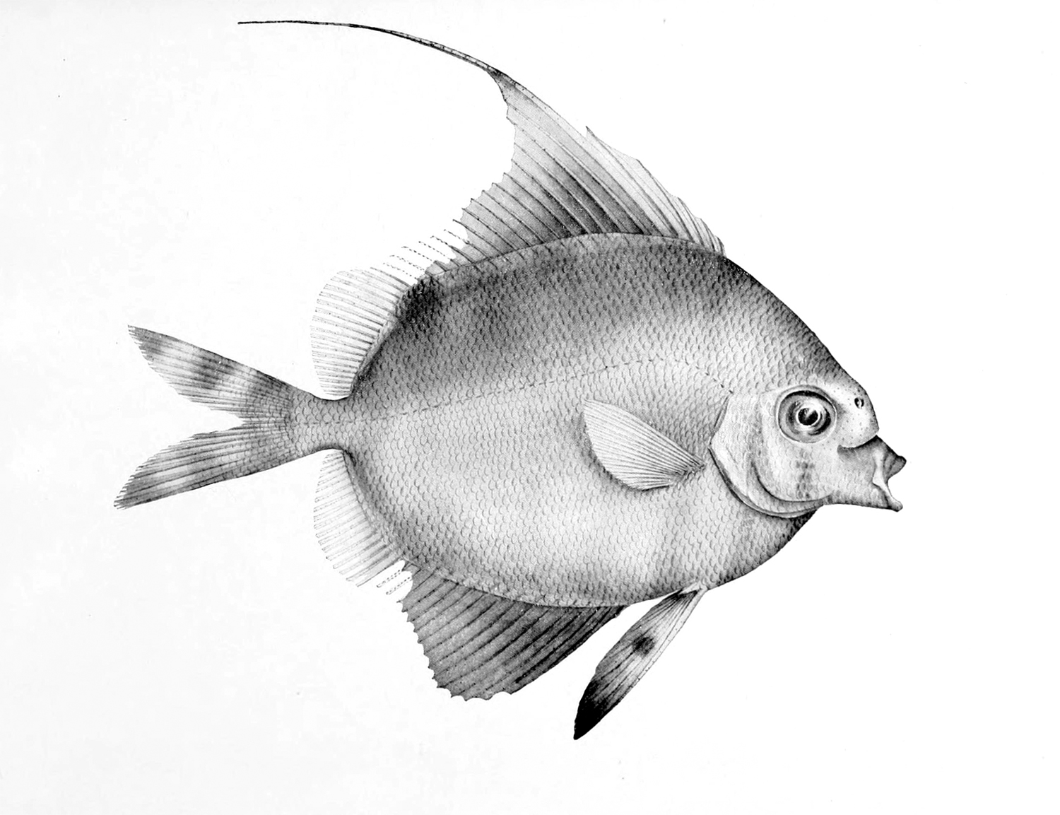 Metavelifer multiradiatus